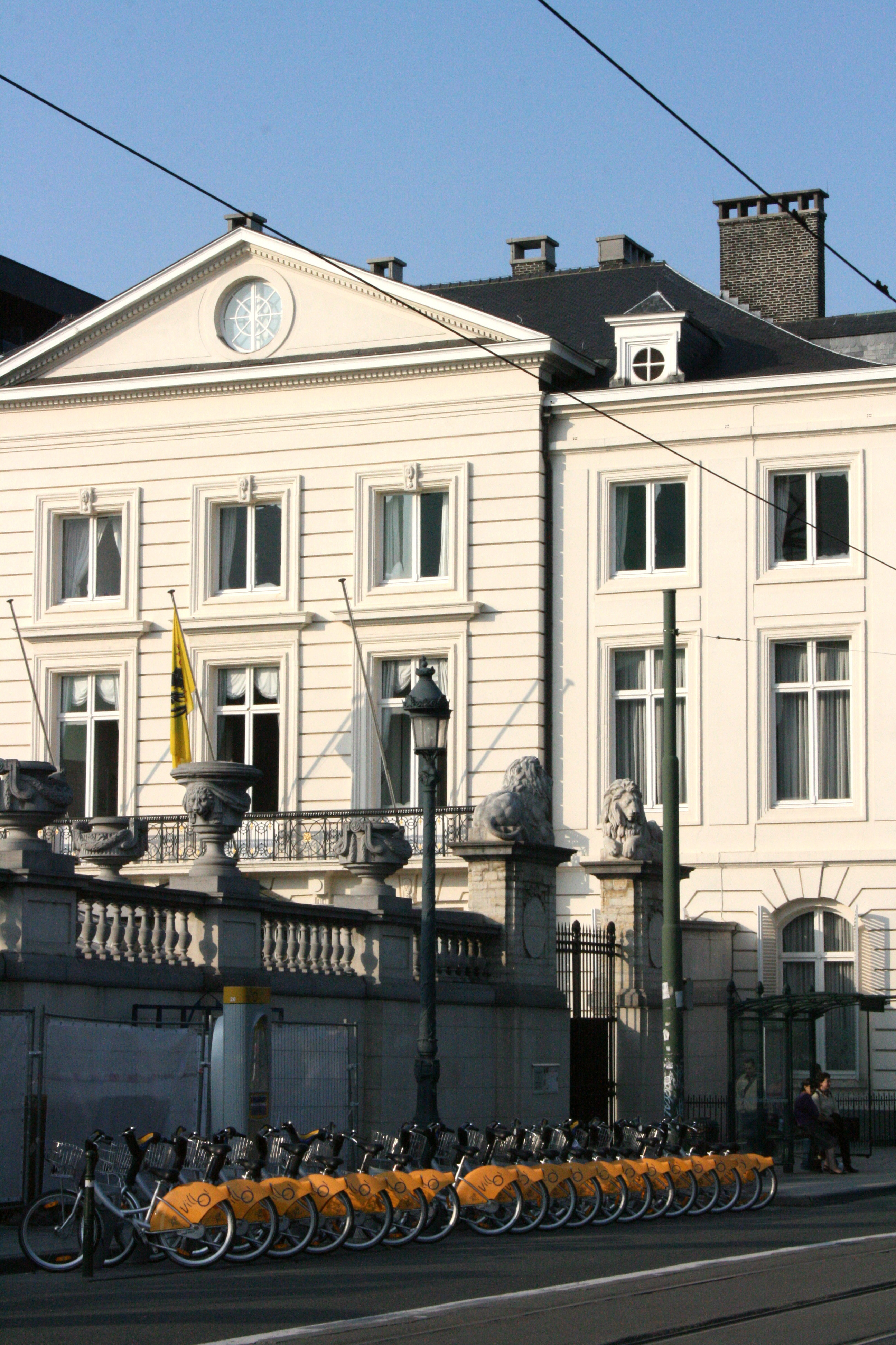 Rue Royale 14, Bruxelles, Belgique. Hôtel Errera (1779), construit par l'architecte Barnabé Guimard. Style classique. A l'origine refuge de l'abbaye de Grimbergen. Depuis 1994, propriété du gouvernement flamand et résidence de foncion du ministre-président flamand. Devant le bâtiment station de vélos du réseau Villo